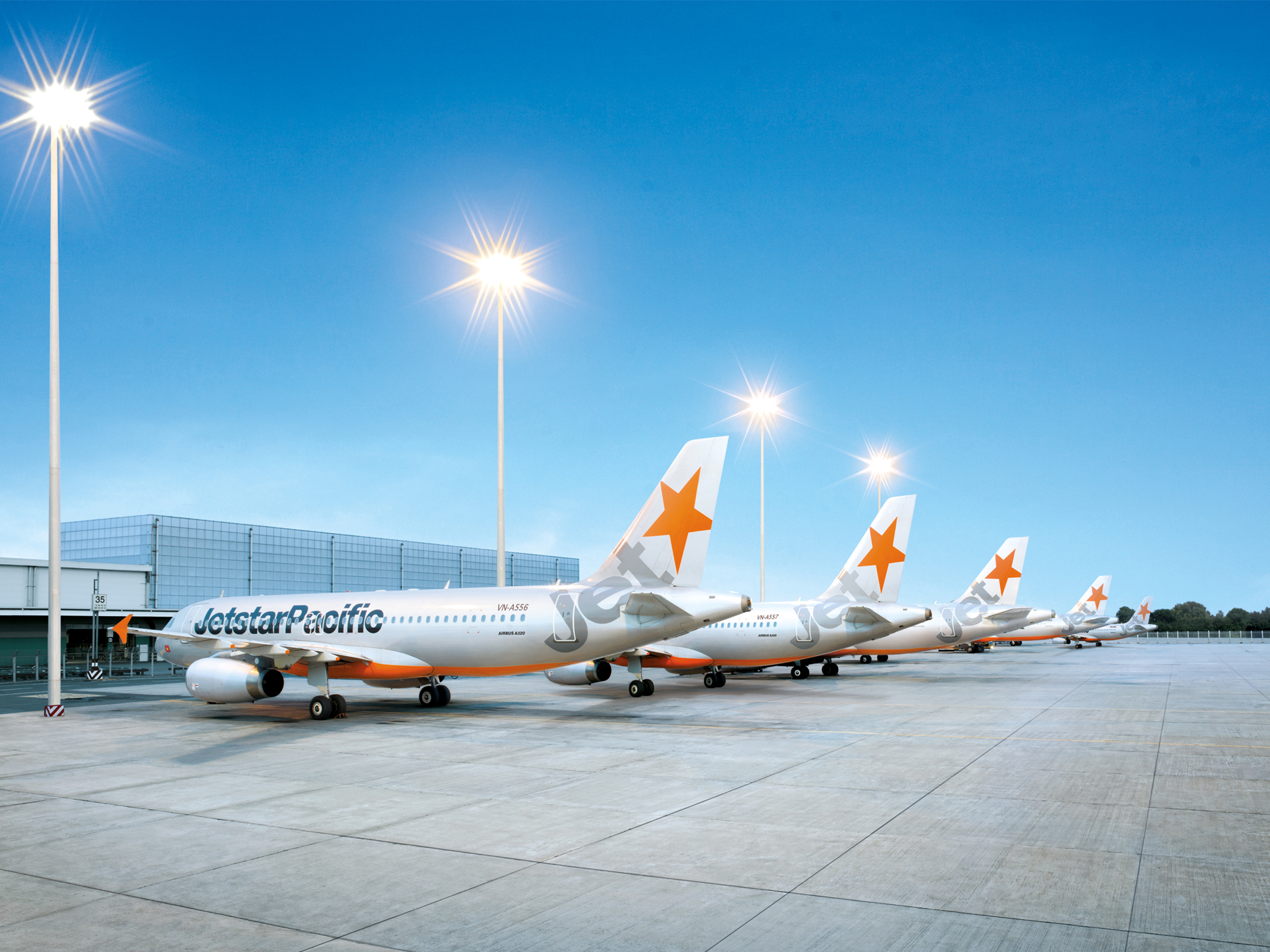 Đội bay Airbus A320s hiện đại của Jetstar Pacific